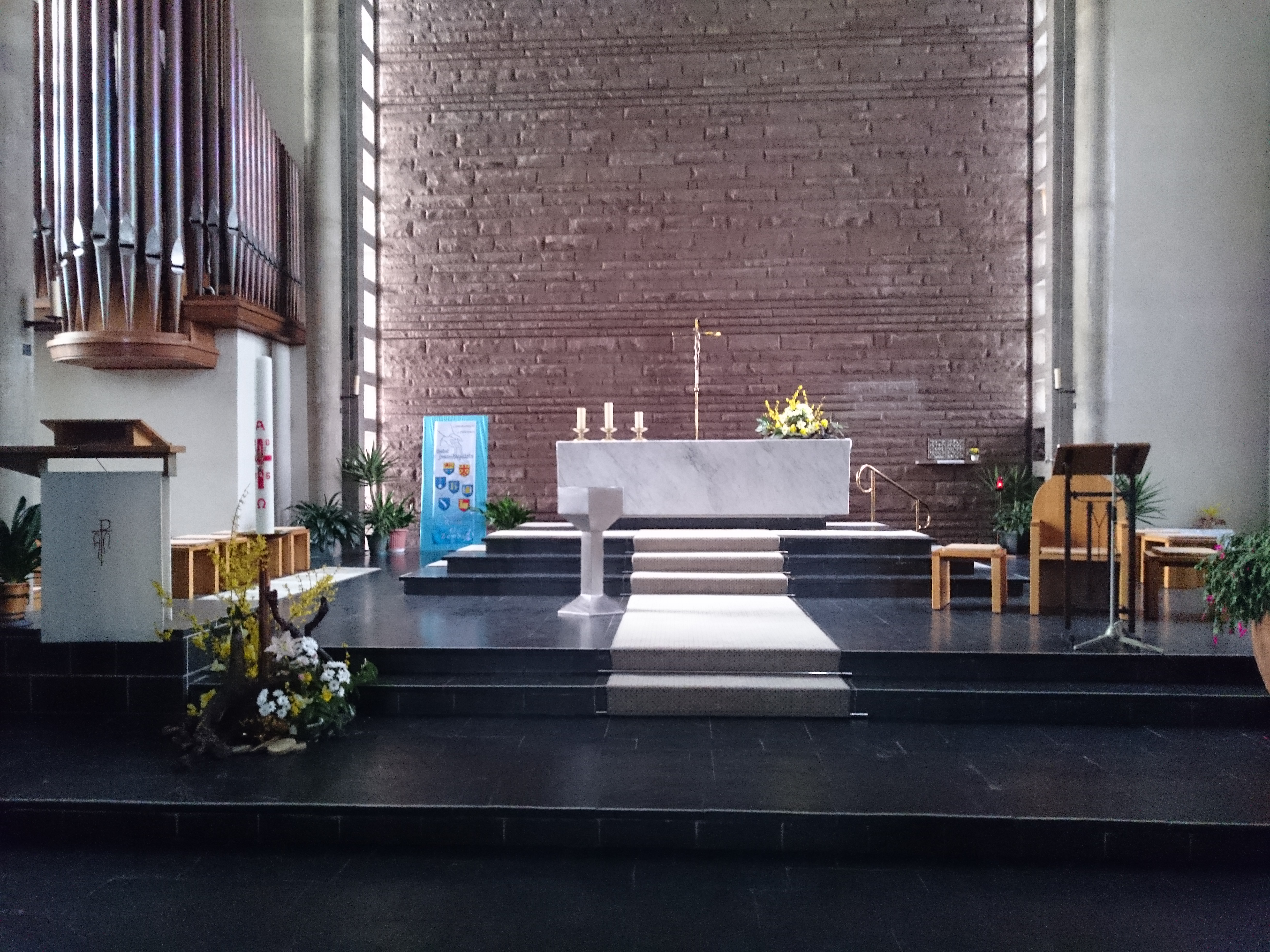 Intérieur de l'église Saint-Michel (Rhinau)